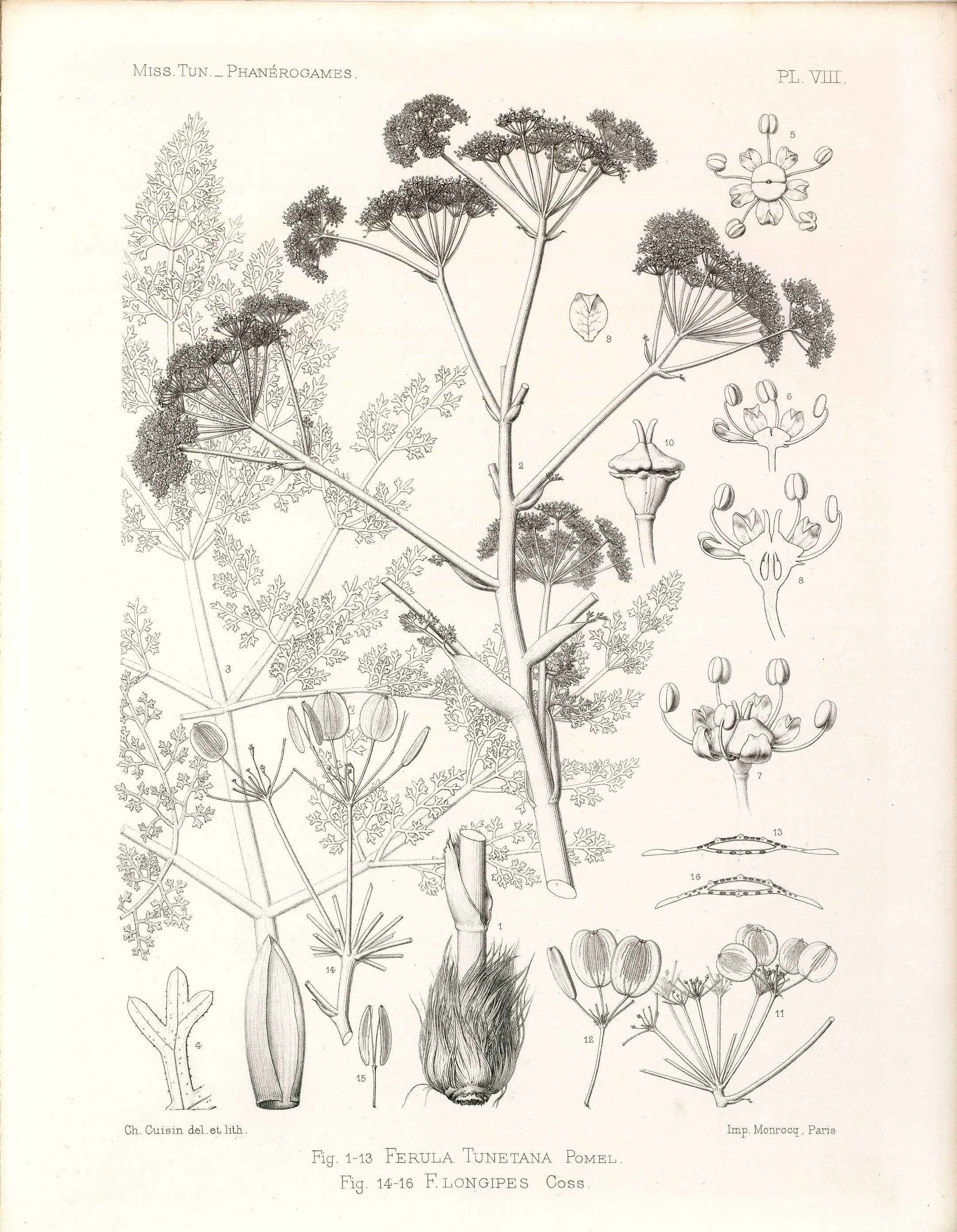 Dessins représentant Ferula tunetana